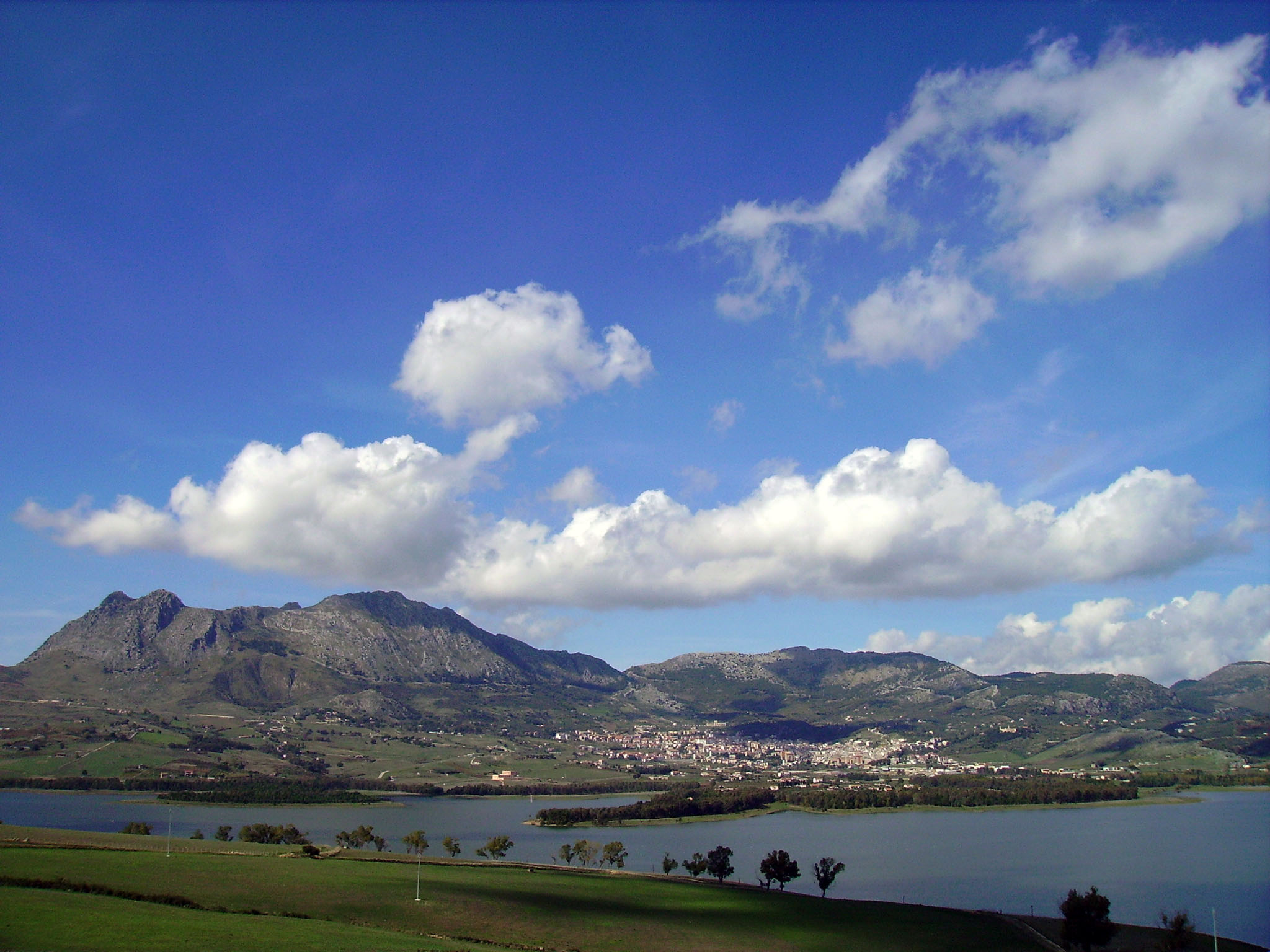 Panoramica di Piana degli Albanesi. Foto scattata dal monte Maganoce.